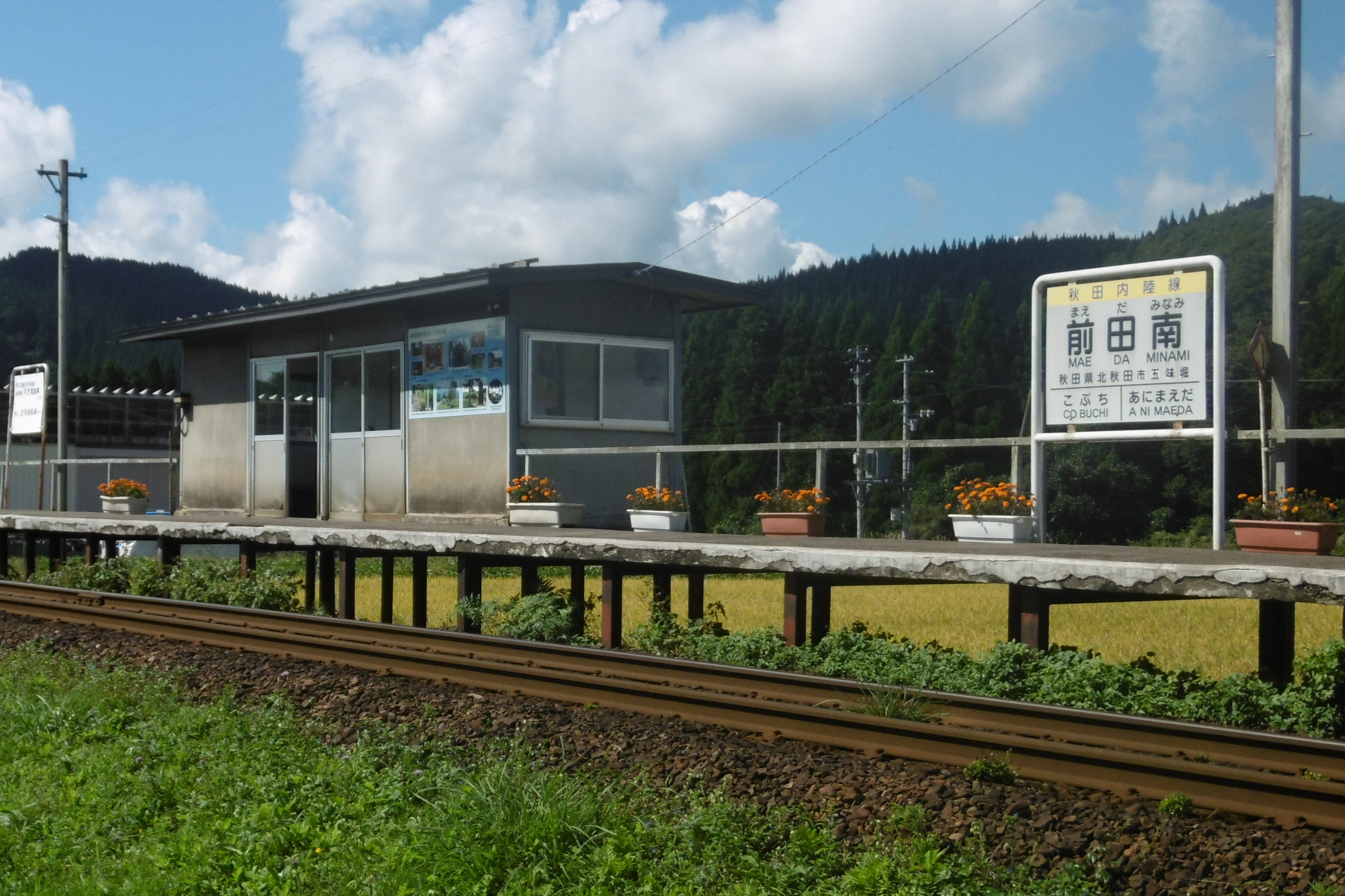 秋田内陸線 前田南駅